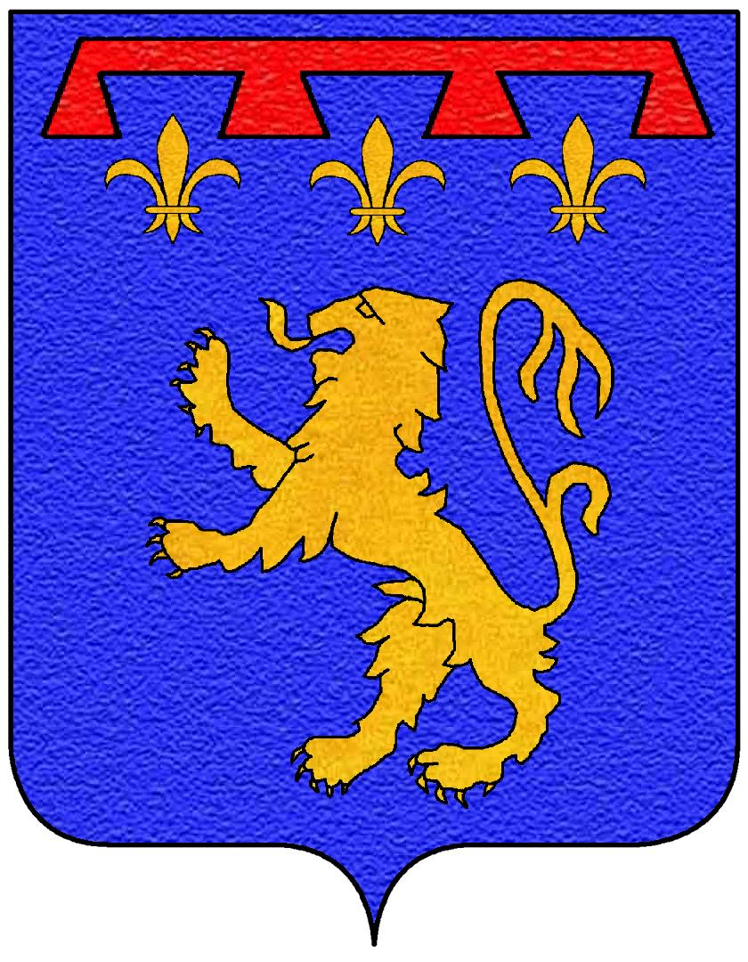 Stemma della famiglia Falzacappa